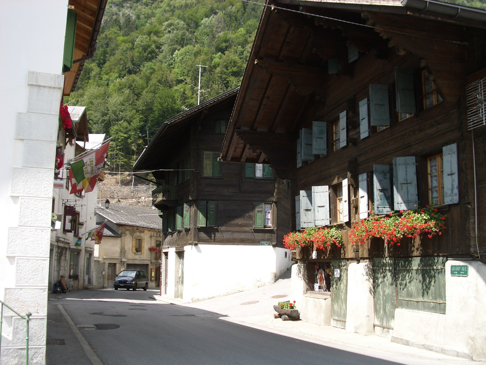 Le Sepey VD, Switzerland self-made, August 2006